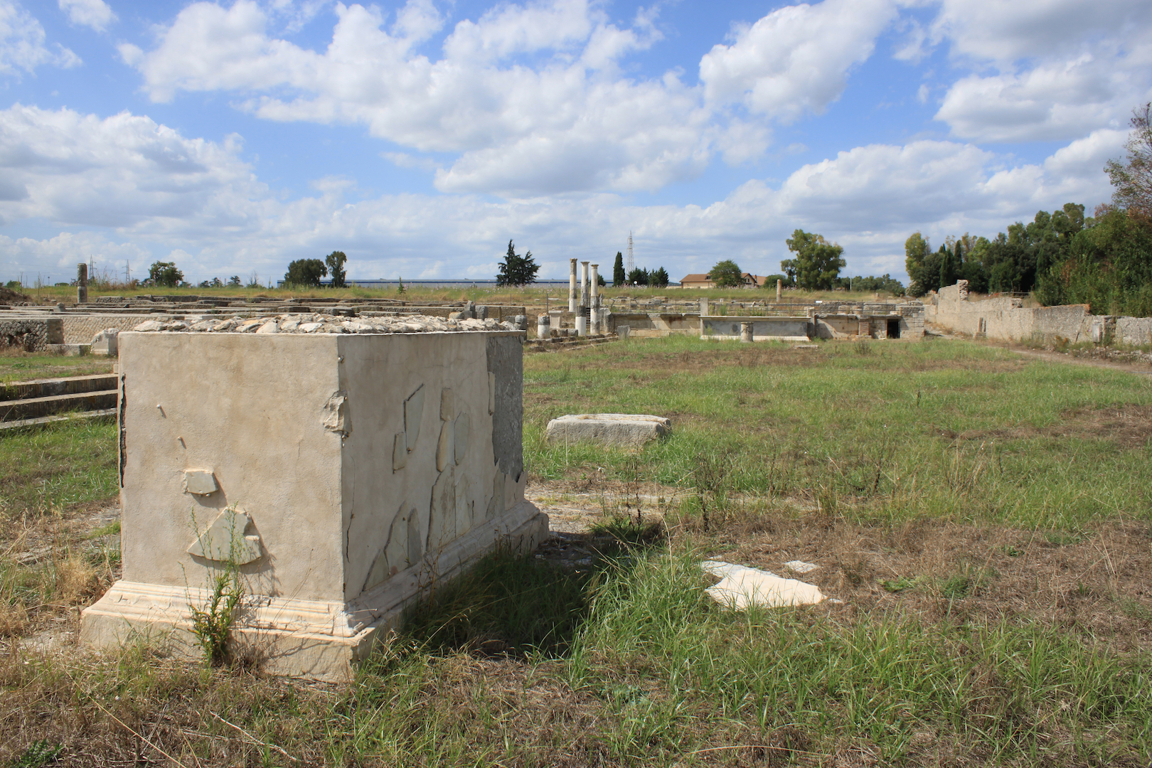 Lucus Feroniae (Italie). Vue du site archéologique. Le forum, base de statue équestre au premier plan.